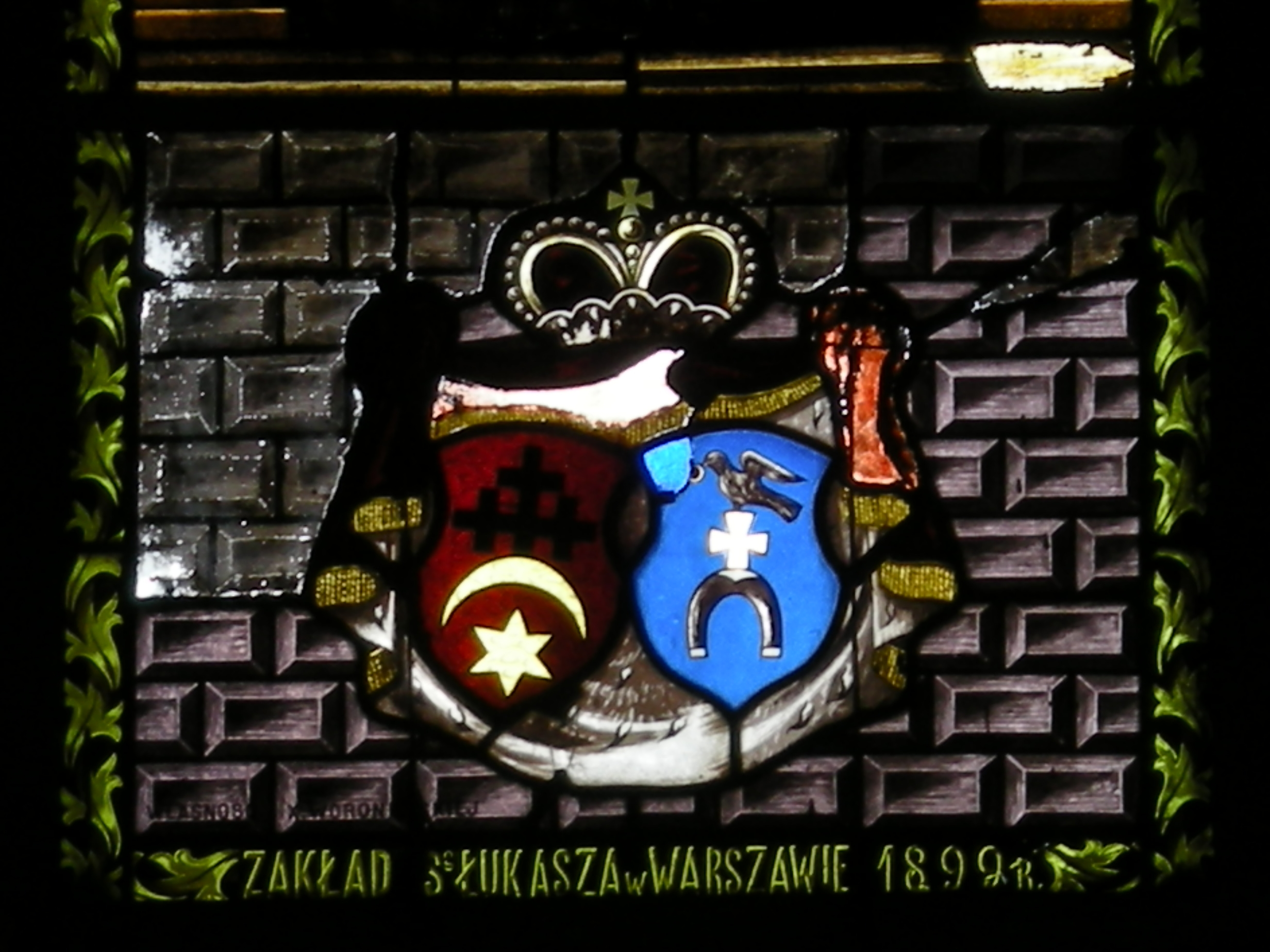 Kartusz z herbami Korybut i Ślepowron na witrażu w kościele parafialnym w Huszlewie.